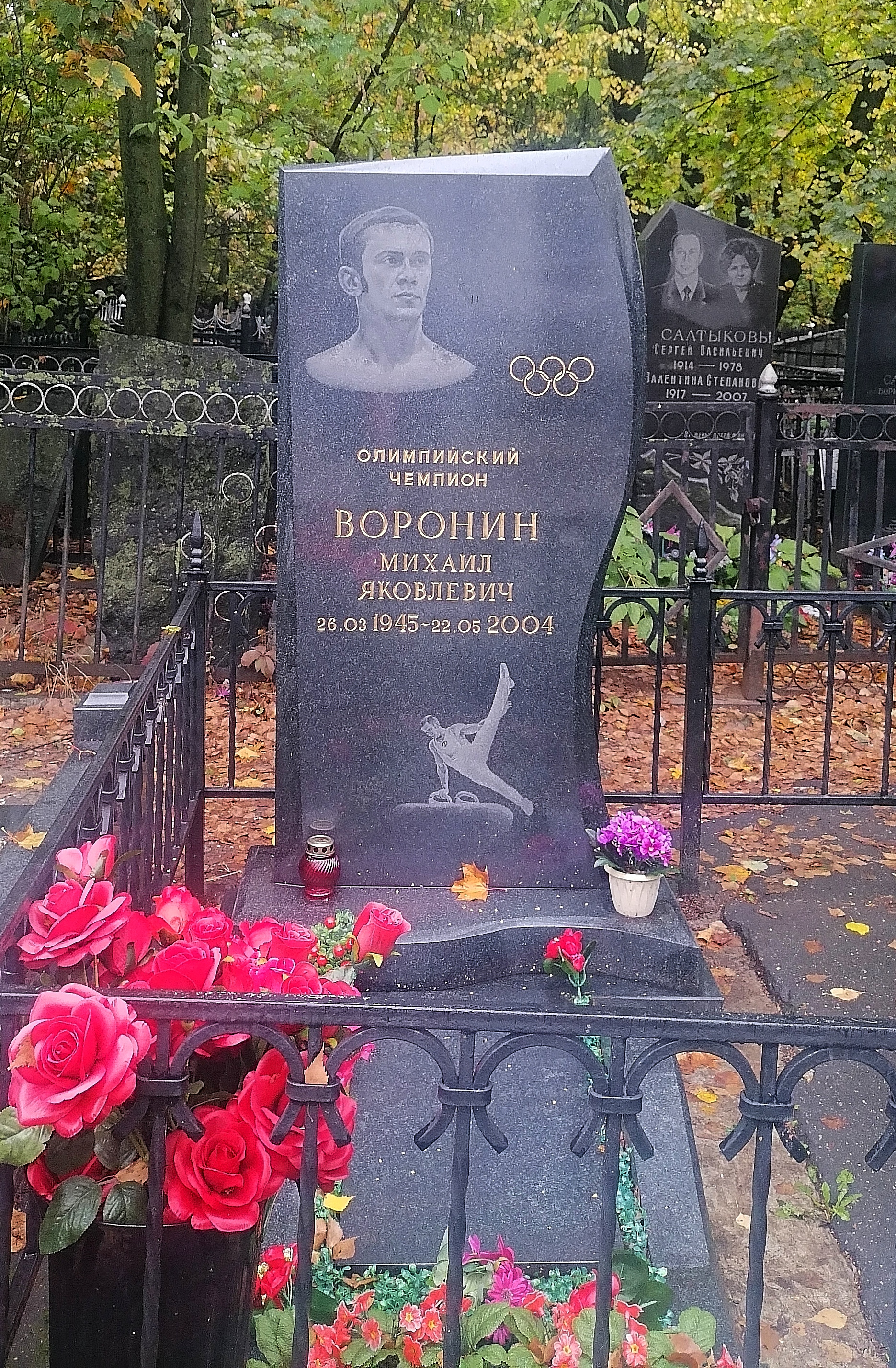 Могила гимнаста Михаила Воронина на Ваганьковском кладбище Москвы.